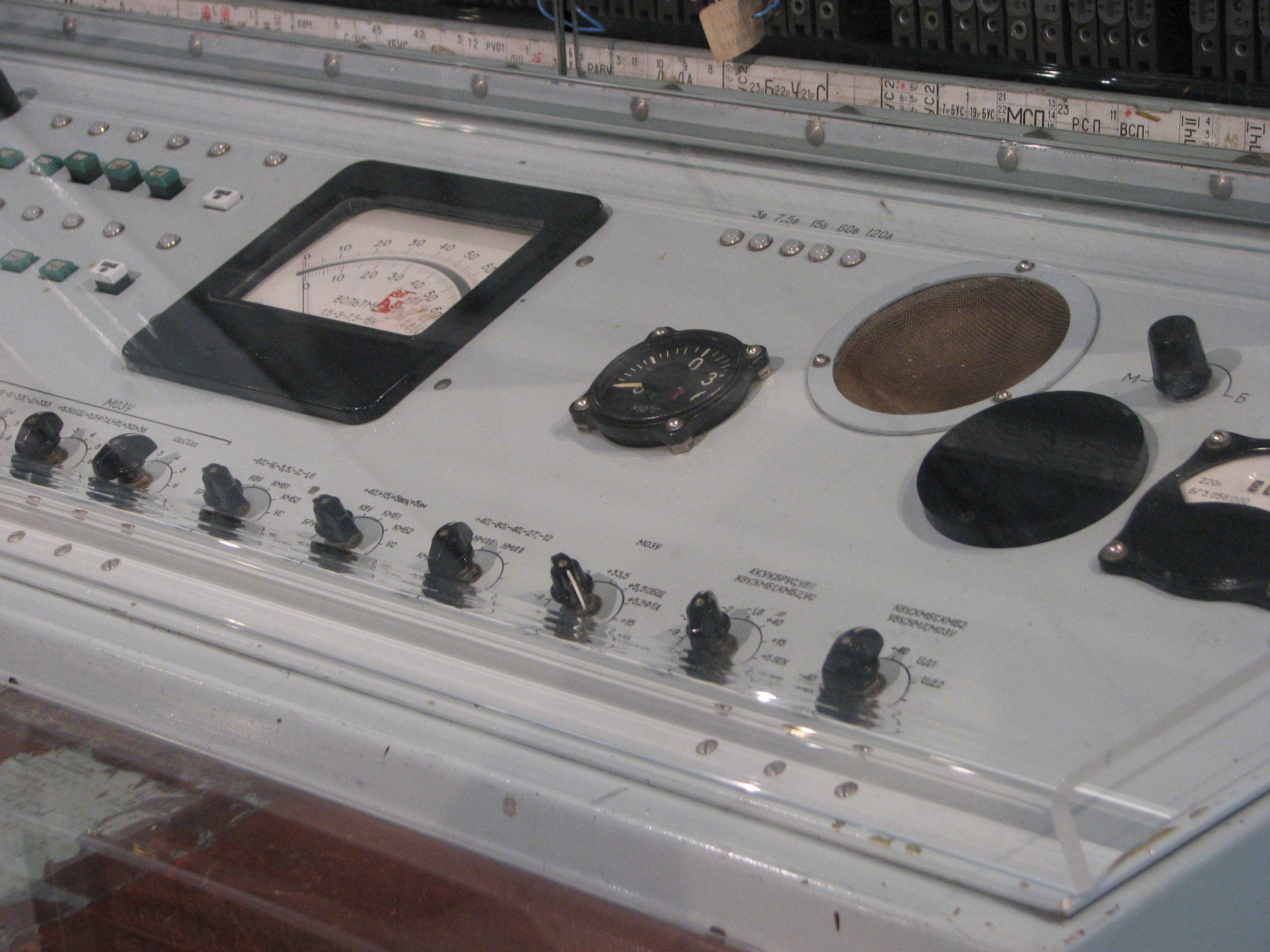 Консоль стойки УВУ